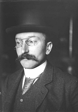 Portret van Frans Erens (1857-1935) "met hoed, lorgnet en jas